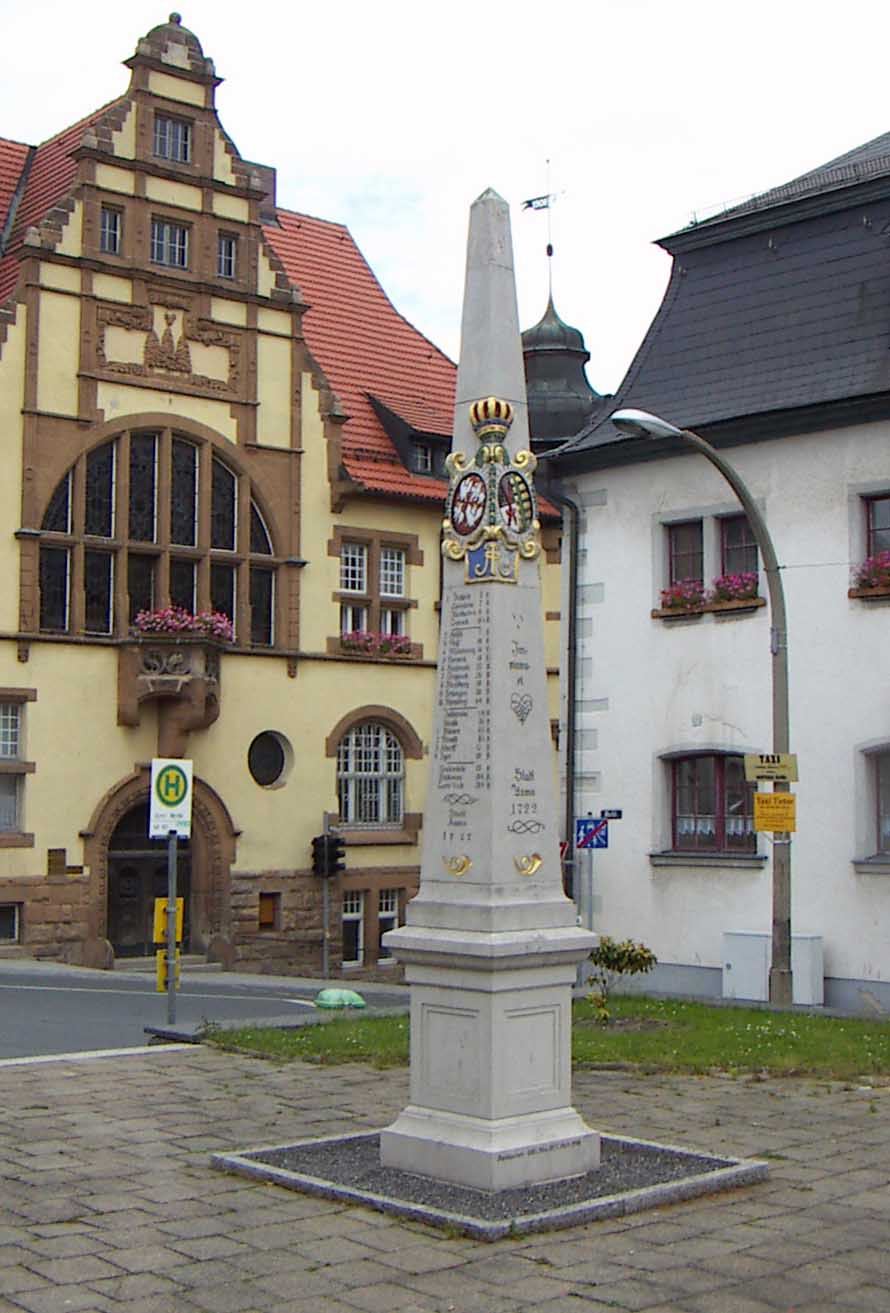 Postdistanzsäule in Auma